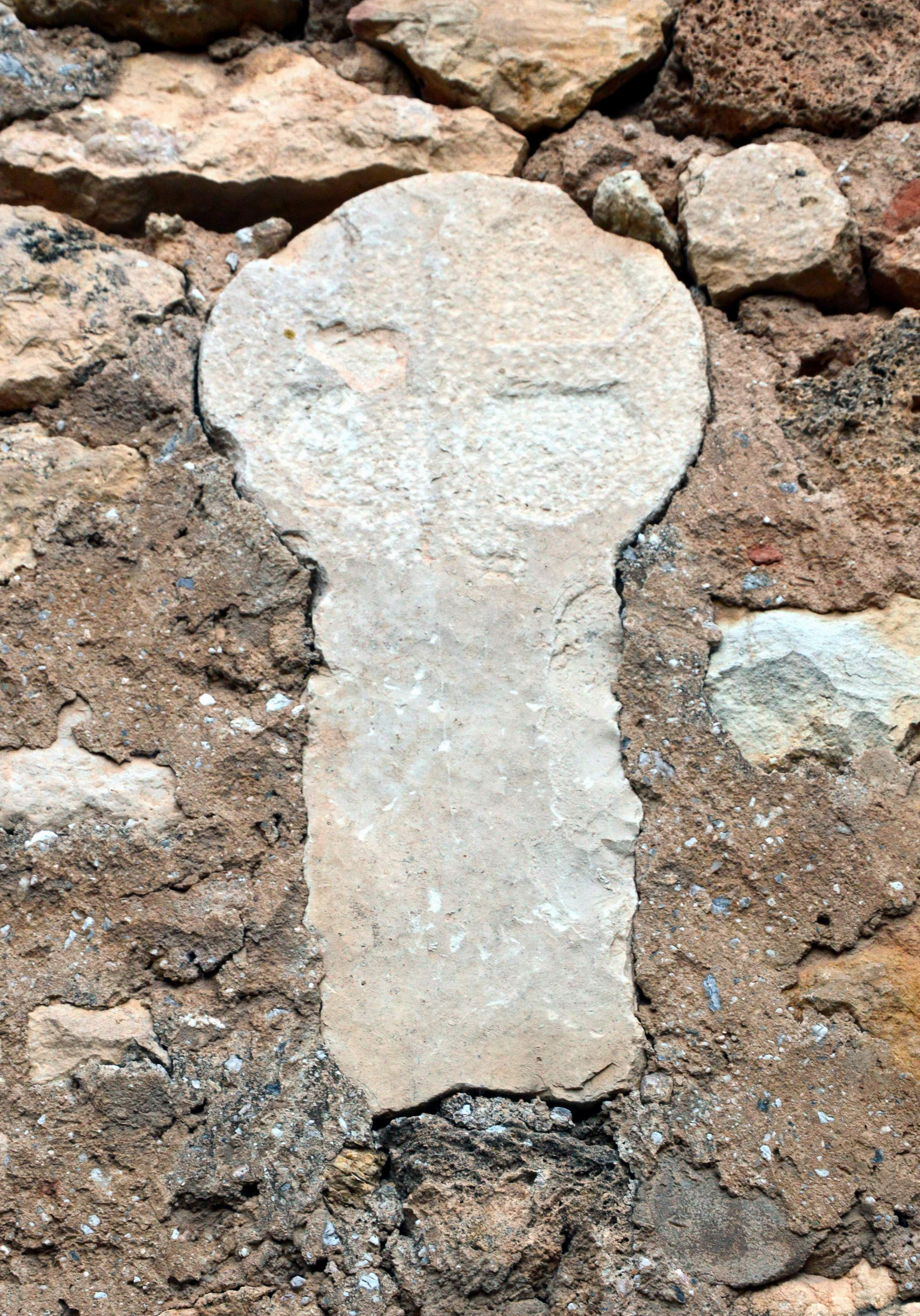 Detalle de estela funeraria discoidea halla en Castielfabib (Valencia), situada en el muro de un corral o descubierto, sector de la calle del Barrioso, correspondiente al recinto amurallado (2019).